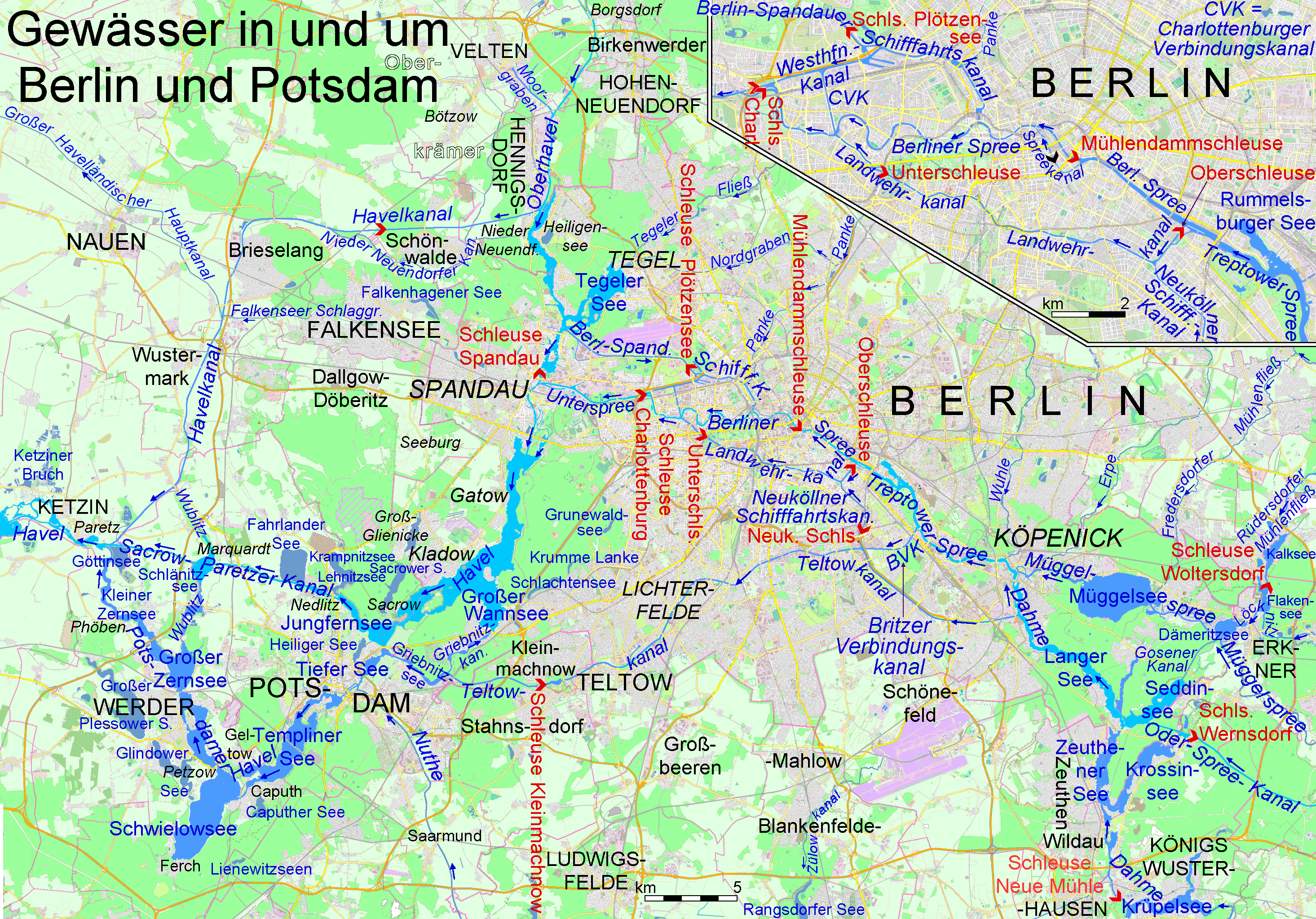 Karte der Berliner Gewässer mit Innenstadtvergrößerung und großer Beschriftung,Hauptwasserstraßen grellblau (Oder-Havel-Wassersraße nach Nordosten, Oder-Spree-Wasserstreaße nach Südosten und untere Havelwasserstraße nach Westen), übrige bundeswasserstraßen tiefblau, andere Gewässer graublau eingezeichnet.